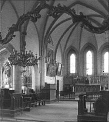 Eglise Saint-Georges d'Yvetot-Bocage : Chevet et clocher côté sud-est, Philippe Des Forts. N° phototype (NUMP) : DSF 1721 P - Négatif noir et blanc ; gélatino-bromure; support verre